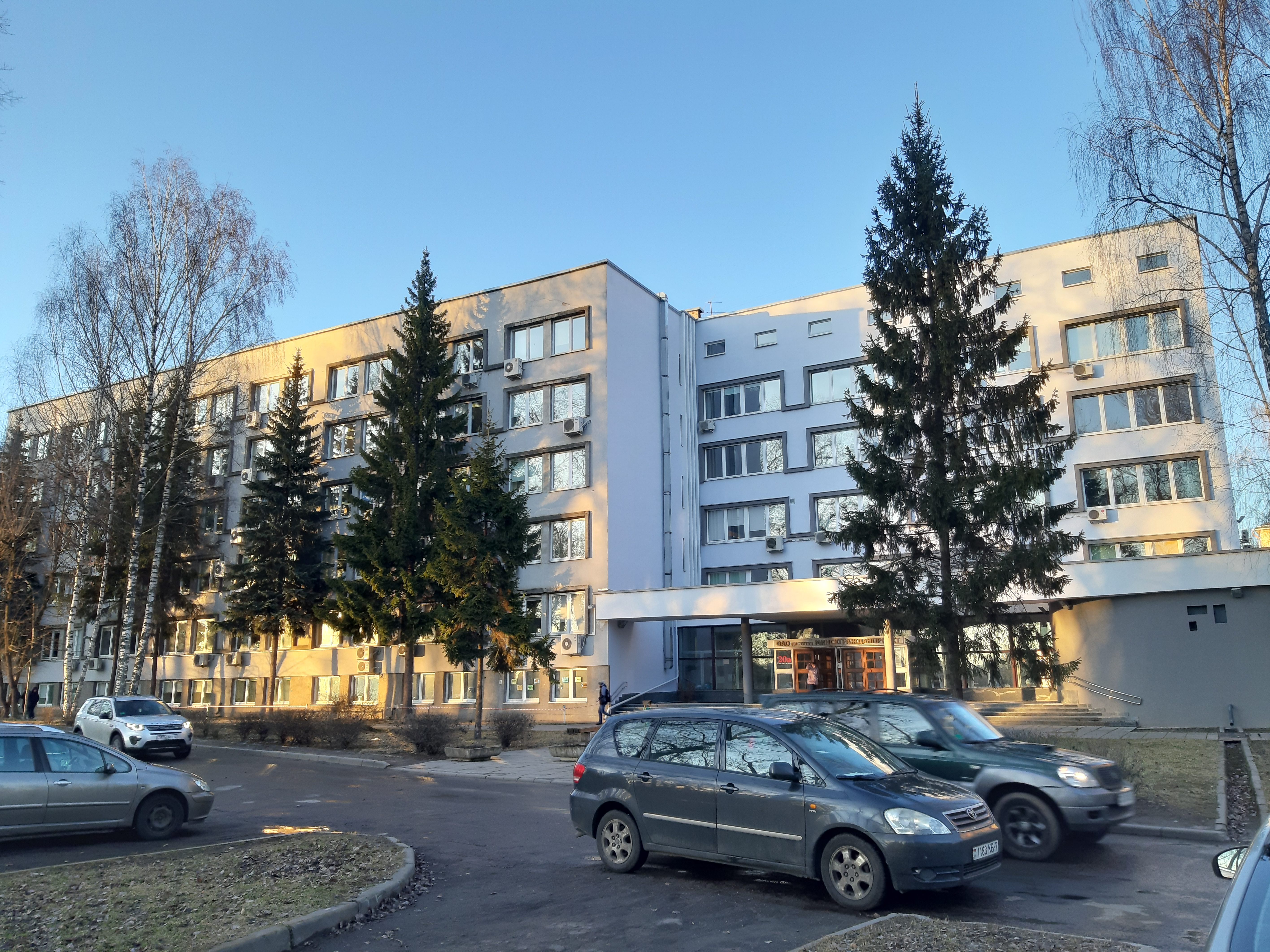 Мінск. Ад Маладзёжнай да Нямігі